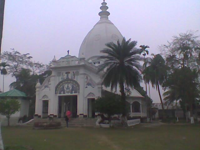 অসমীয়া: কোচবিহাৰৰ মধুপুৰ সত্ৰ